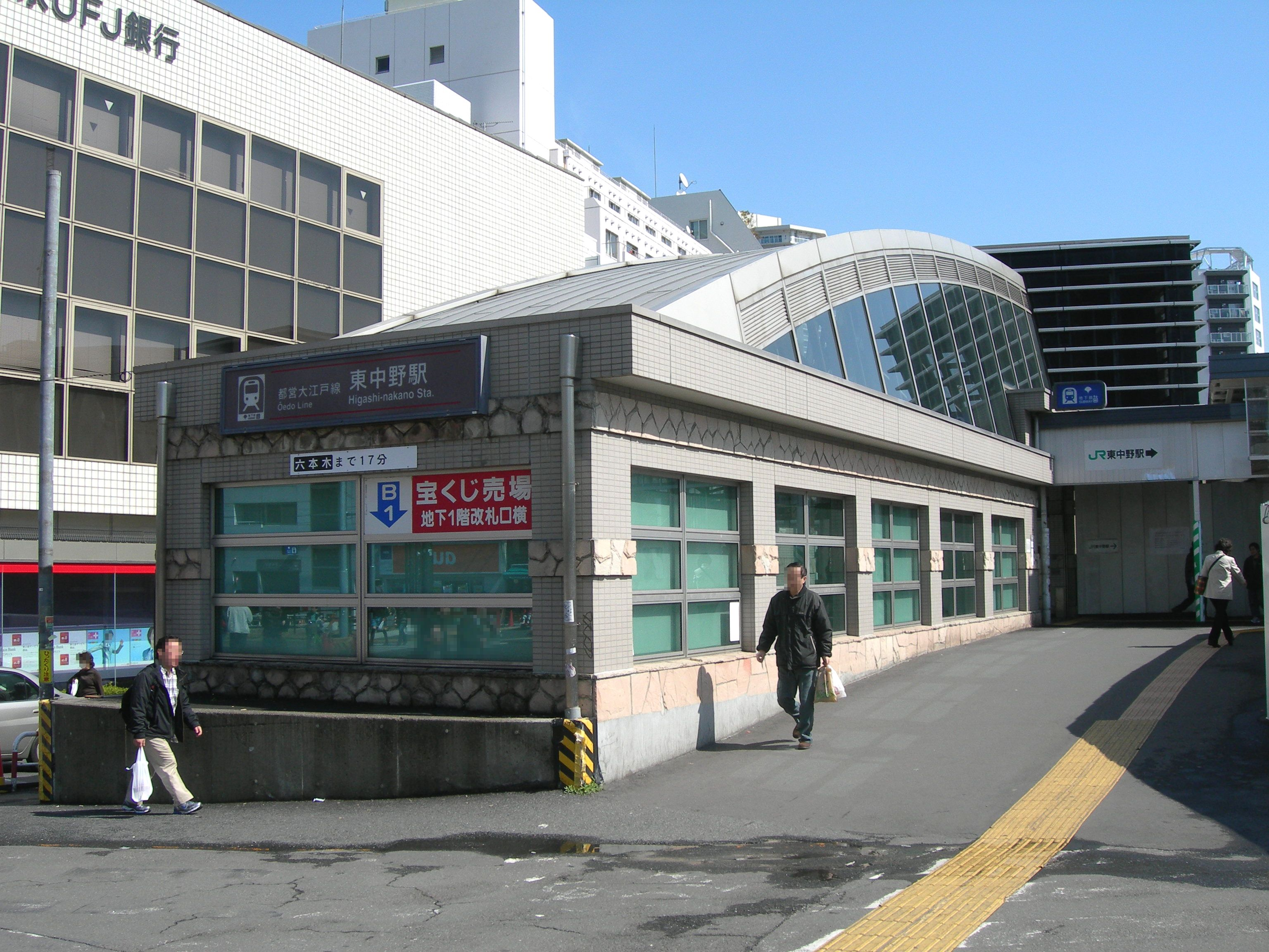 東中野駅西口